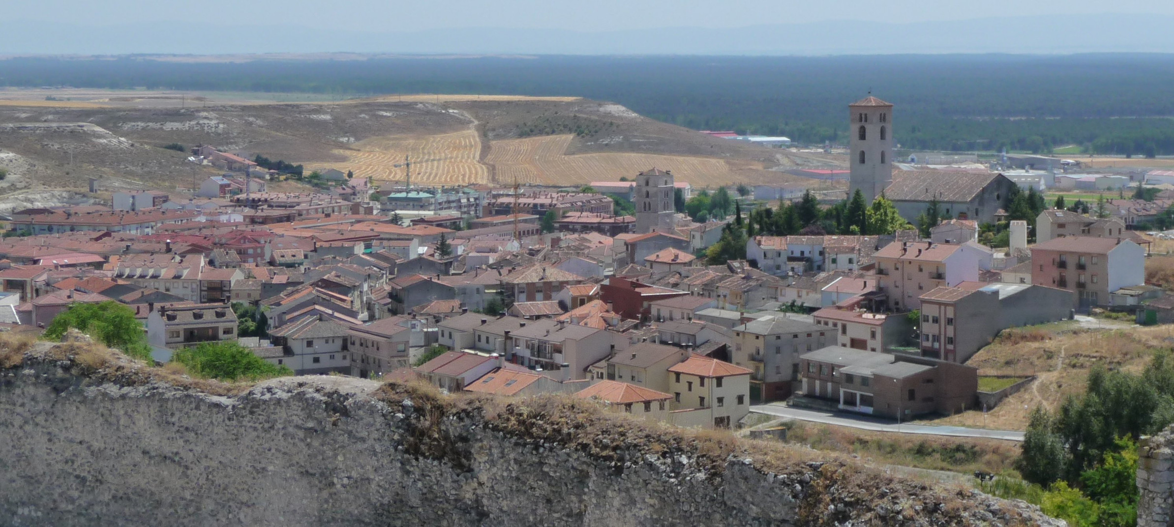 Cuellar vista desde su castillo